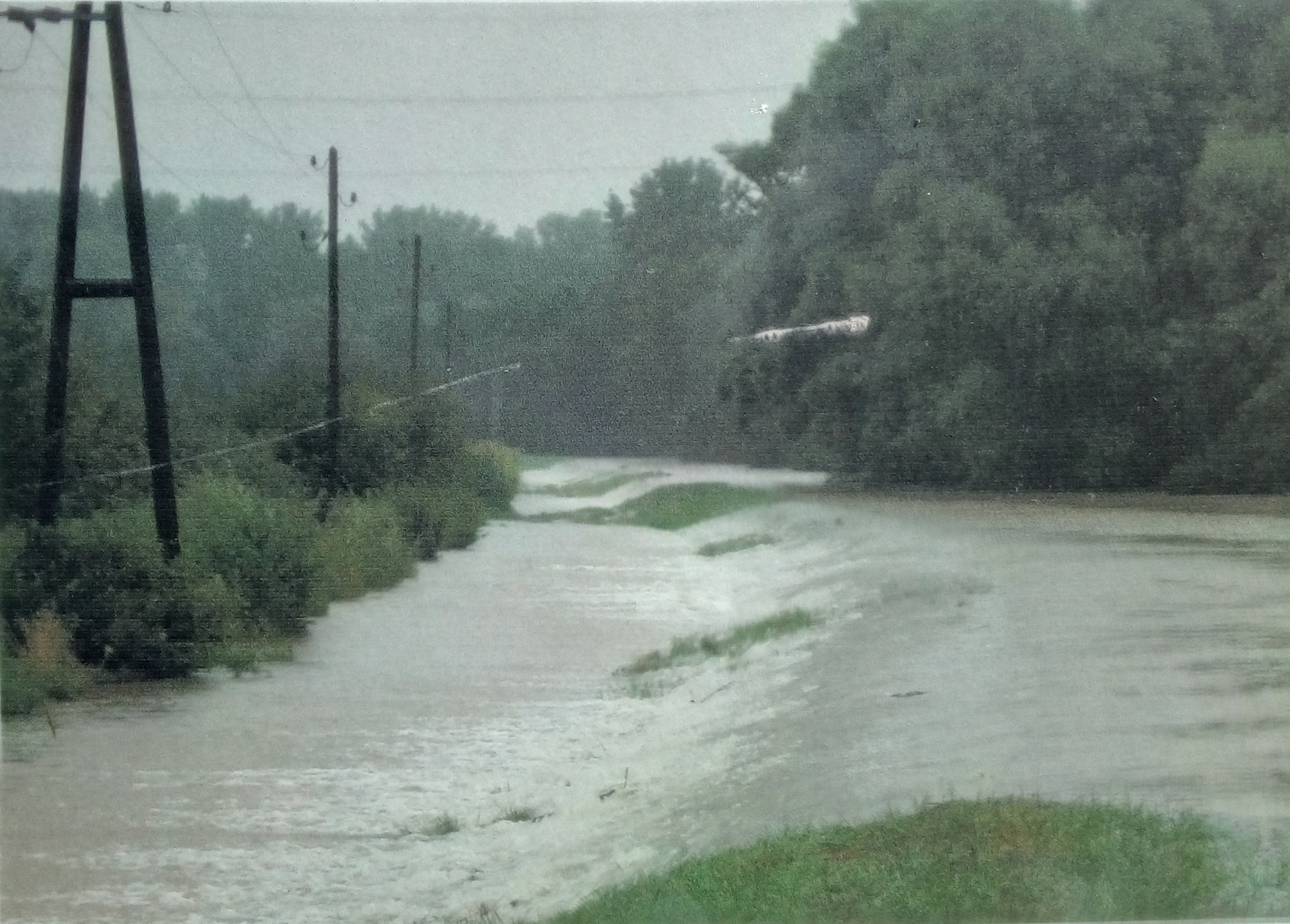 Polder Daxlander Au, Überströmen des Sommerdeichs bei einen Hochwasser im August 2007. Bild ist Teil der Informationstafel an der Daxlander Au